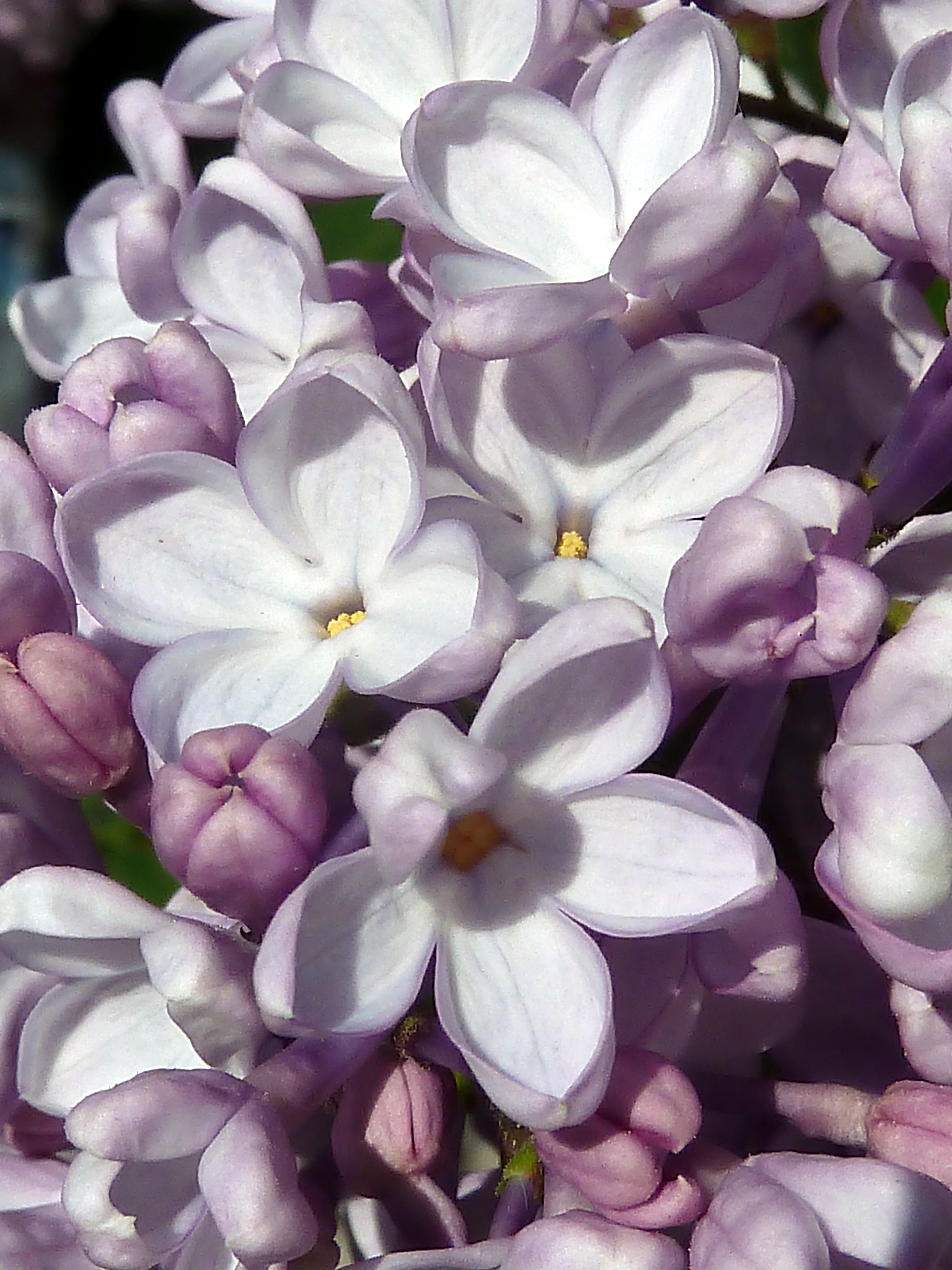 Syringa vulgaris (Lila) - Inflorescencia, detalle. Hay flores con corola pentalobulada. - Cultivado/ornamental, Plaza de Basilea, Barrio de La Guindalera, Distrito de Salamanca, Madrid Capital (España).